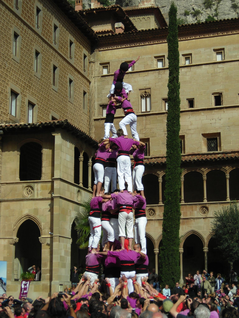 4 de set amb l'agulla dels Moixiganguers d'Igualada, realitzat davant el Monestir de Montserrat